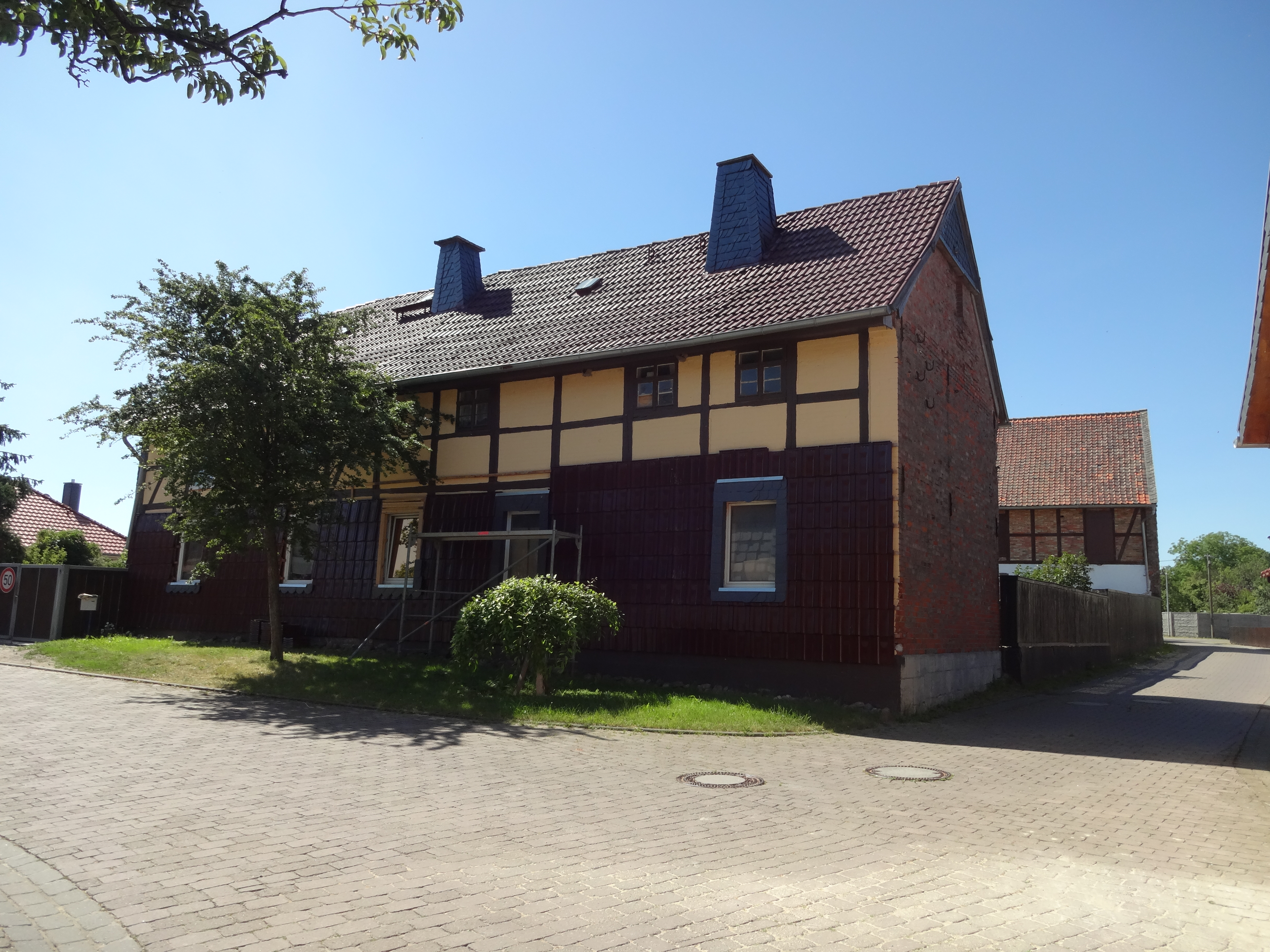 denkmalgeschützter Bauernhof in der Friedrichstraße 8 in Langeln, Gemeinde Nordharz